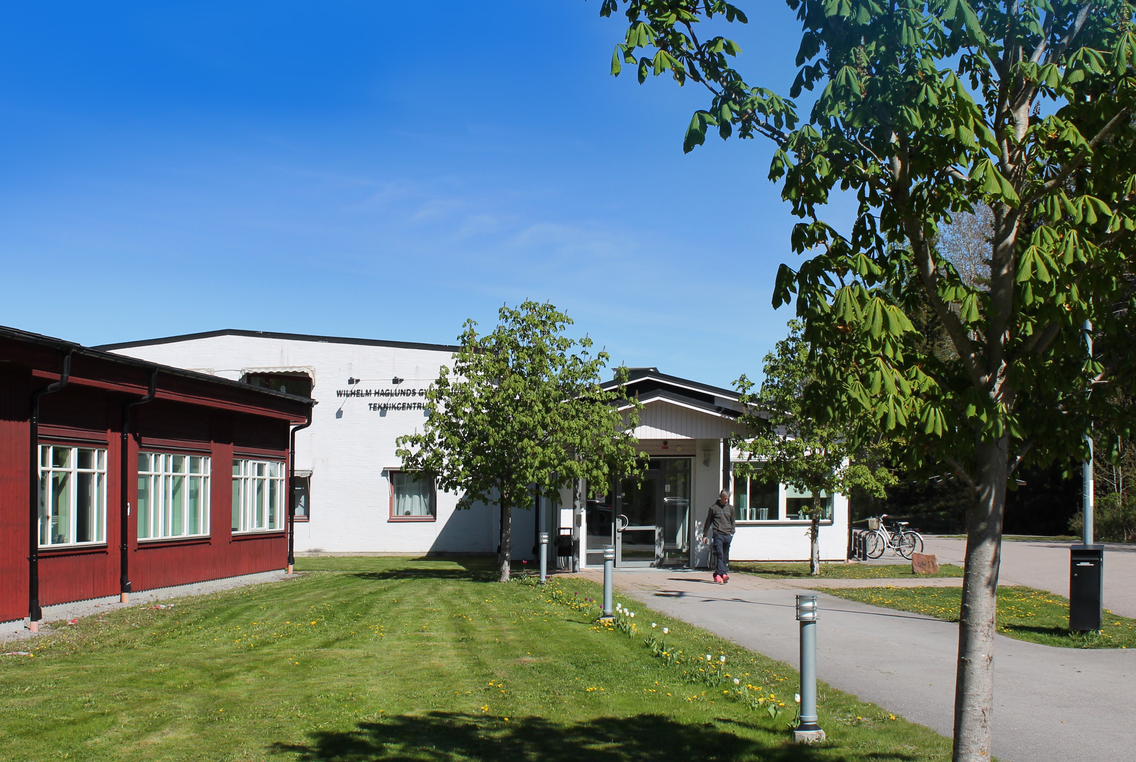 Entrén till Wilhelm Haglunds gymnasieskola i Gimo.